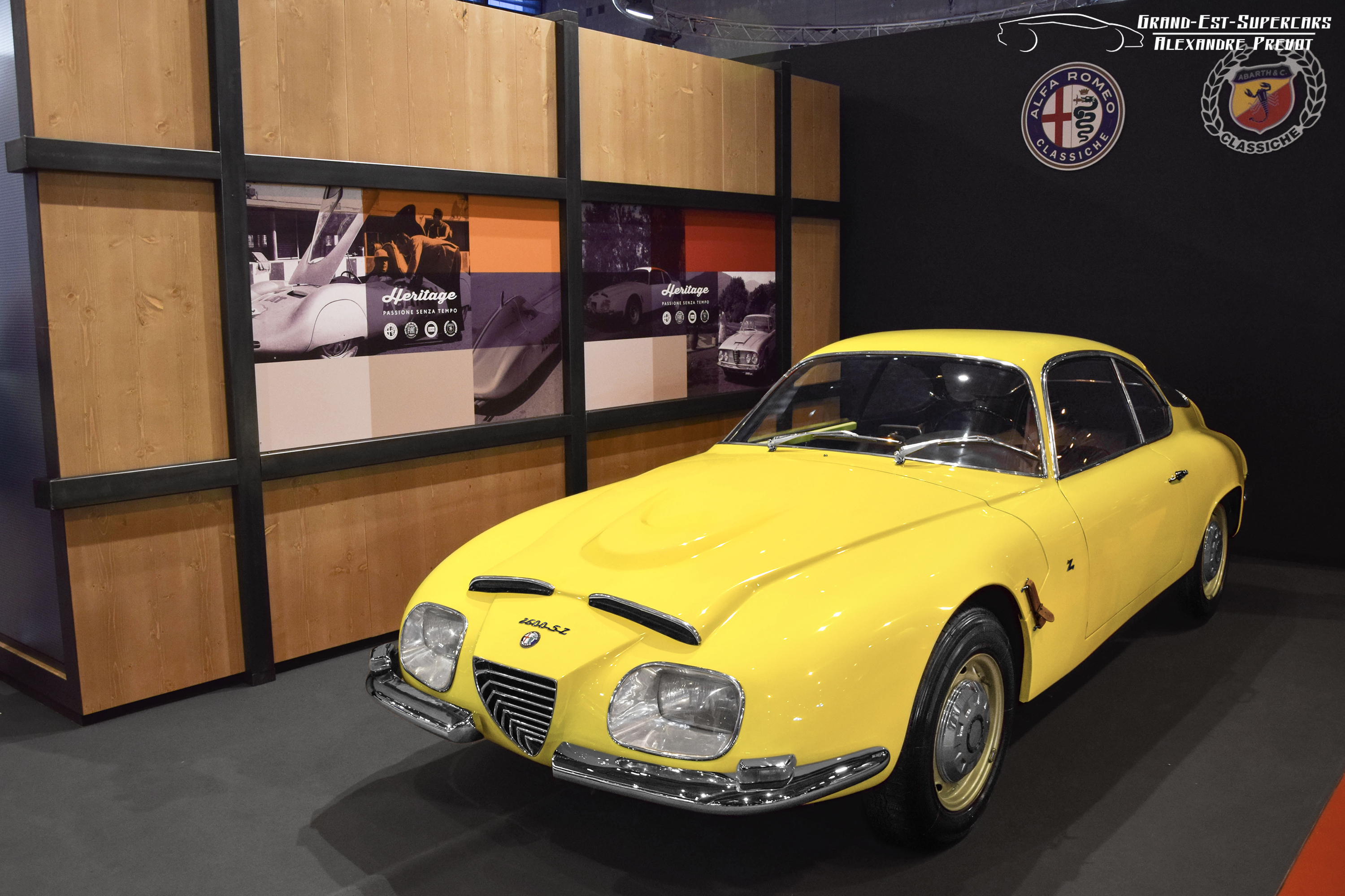 Année du modèle présenté : 1963